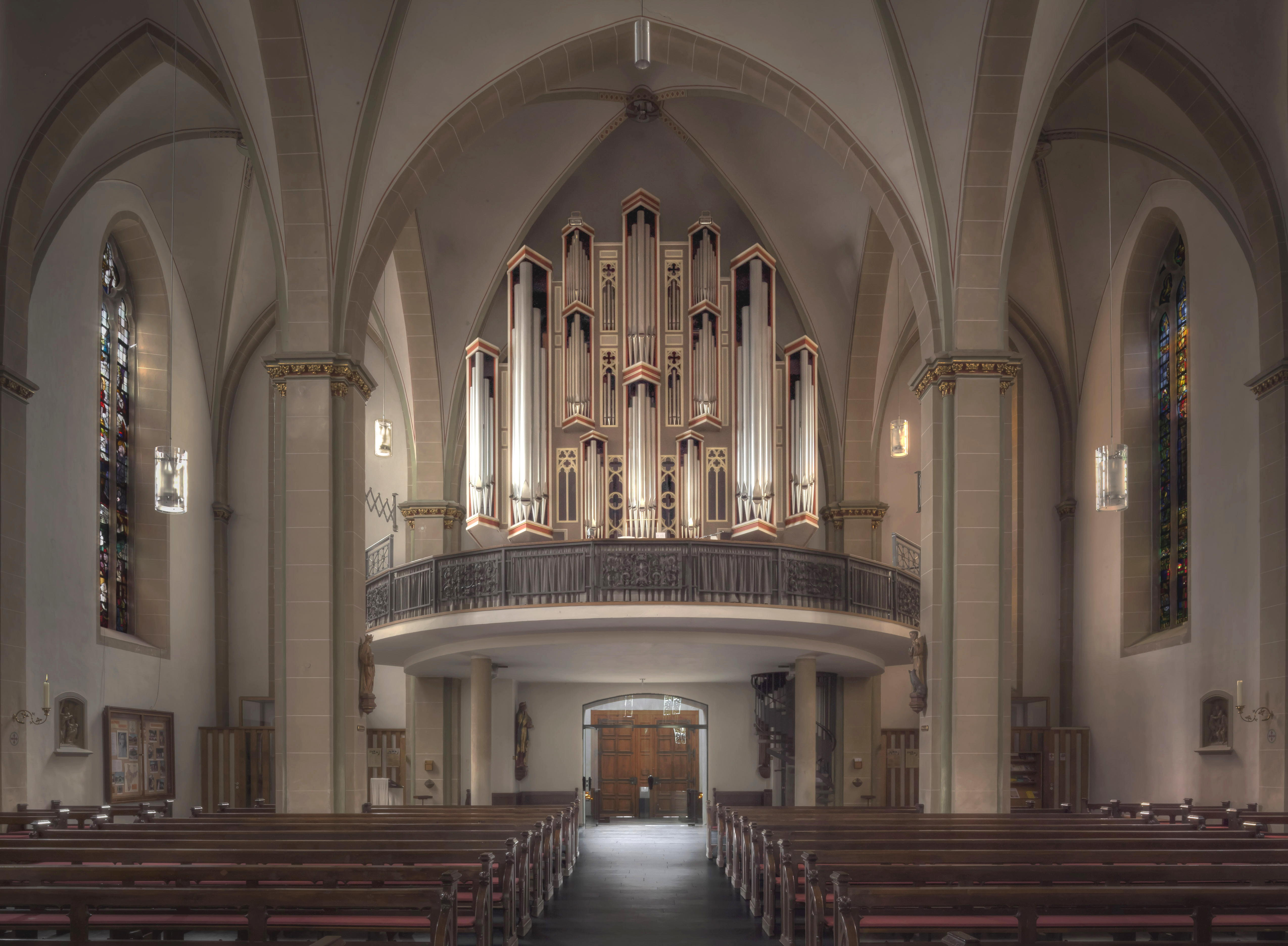 Orgel in St. Johannes, Oelde